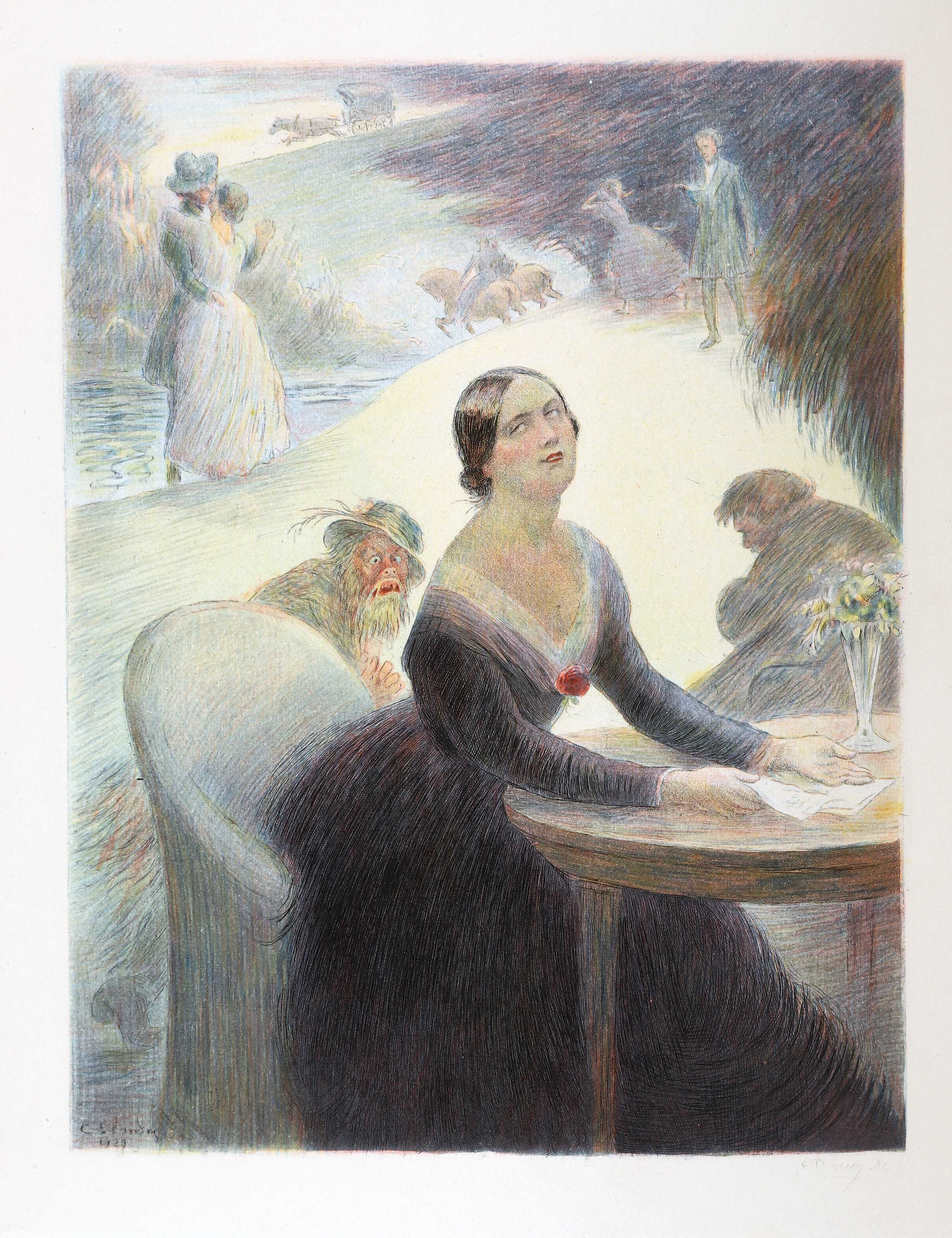 Illustration de Charles Léandre pour le livre Madame Bovary de Flaubert, gravé à l’eau-forte en couleur par Eugène Decisy. Frontispice.